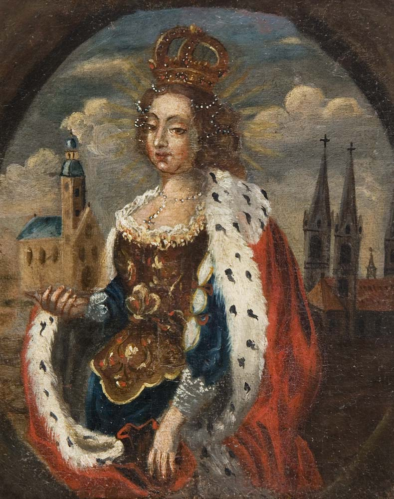 Kunigunde von Luxemburg